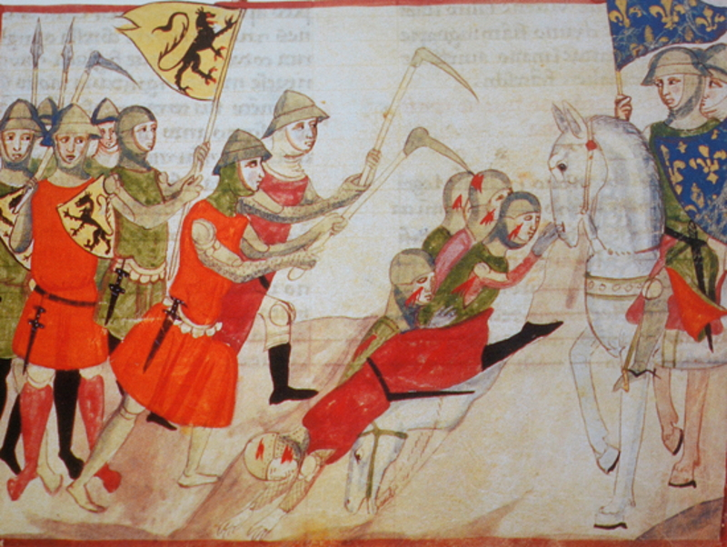 Battle of Courtrai